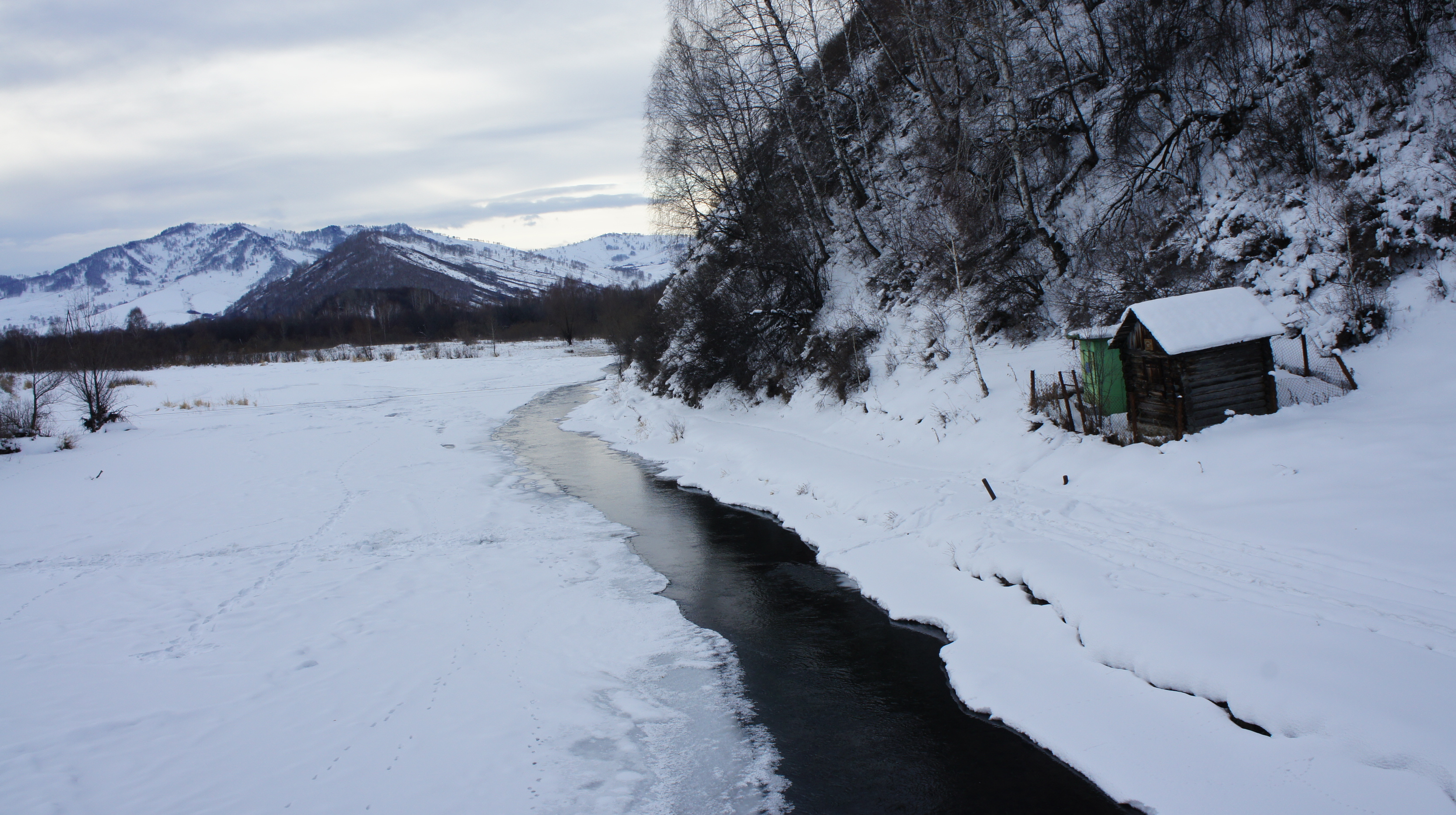 река Ануй зимой возле водомерного поста в Солонешном